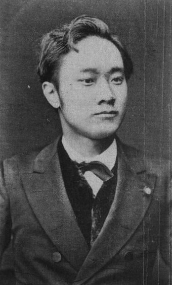 柳原前光の肖像写真。